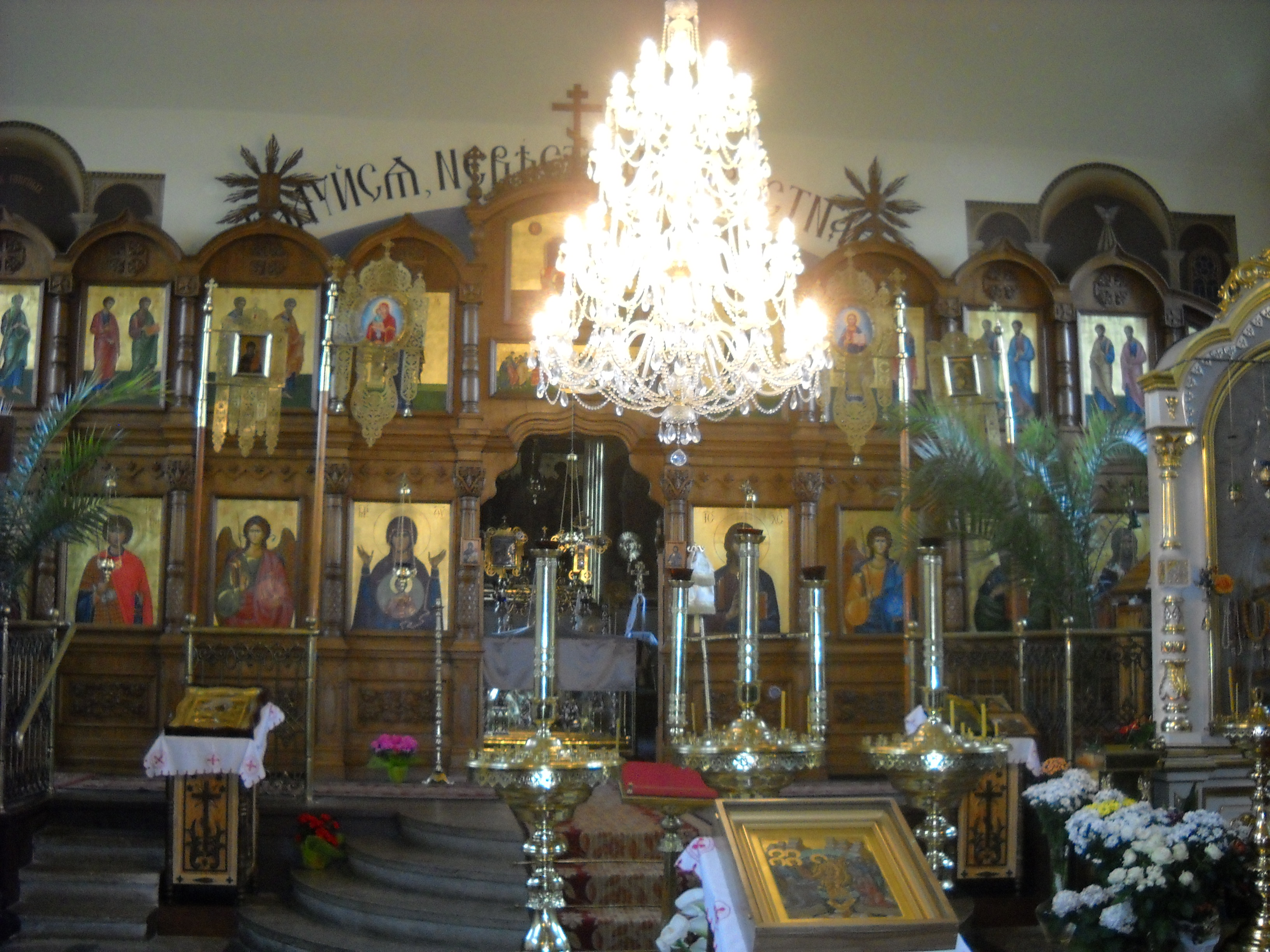 Wnętrze cerkwi św. Jana Teologa w monasterze w Supraślu